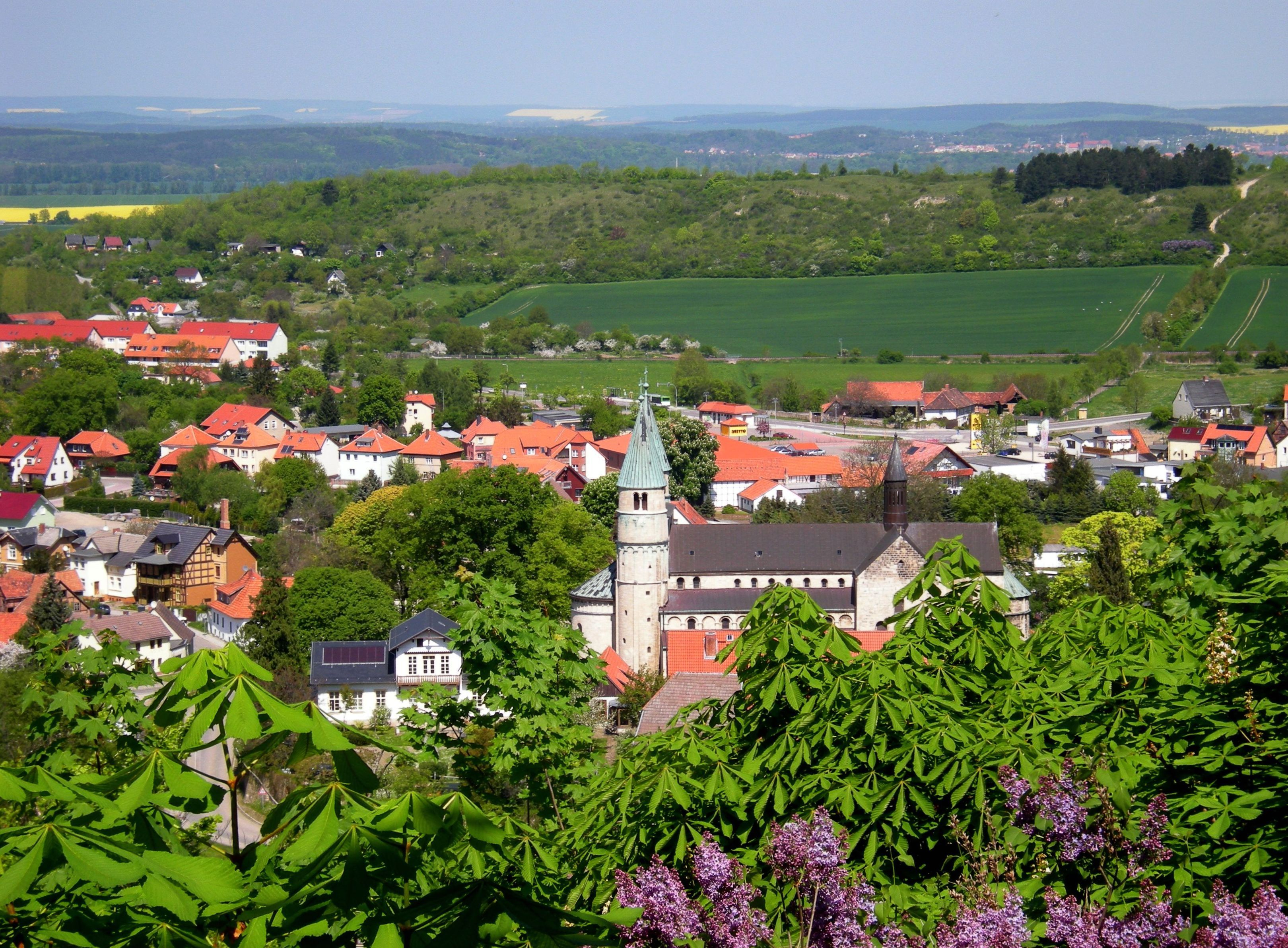 Gernrode - Blick von der Burg auf Stiftskirche.jpg